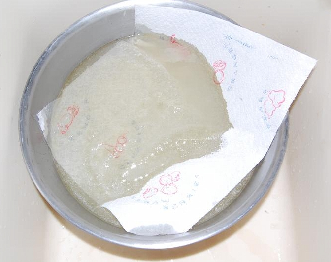 Degraissieren (Entfetten) einer Hühnerbrühe, die zum Abkühlen in eine Metallschüssel abgeseiht wurde, durch Absaugen des Fetts mit Hilfe eines Stücks Küchenpapier.